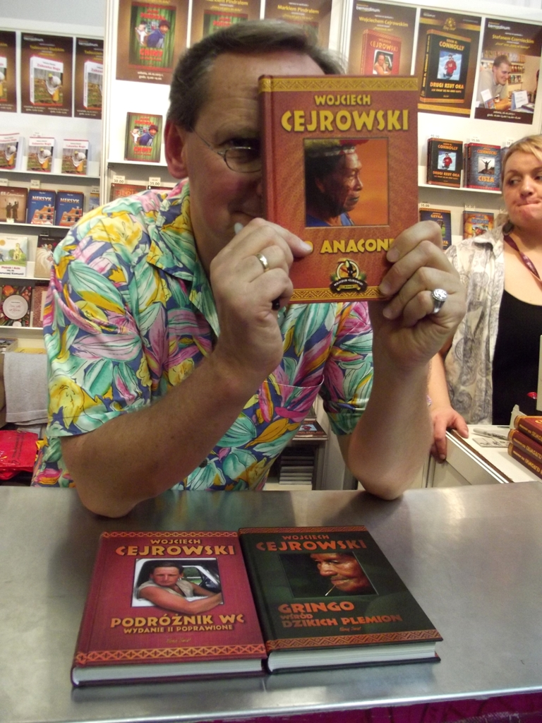 Wojciech Cejrowski podczas 17. Targów Książki w Krakowie, "Rio Anaconda", "Podróżnik WC" i "Gringo wśród dzikich plemion".